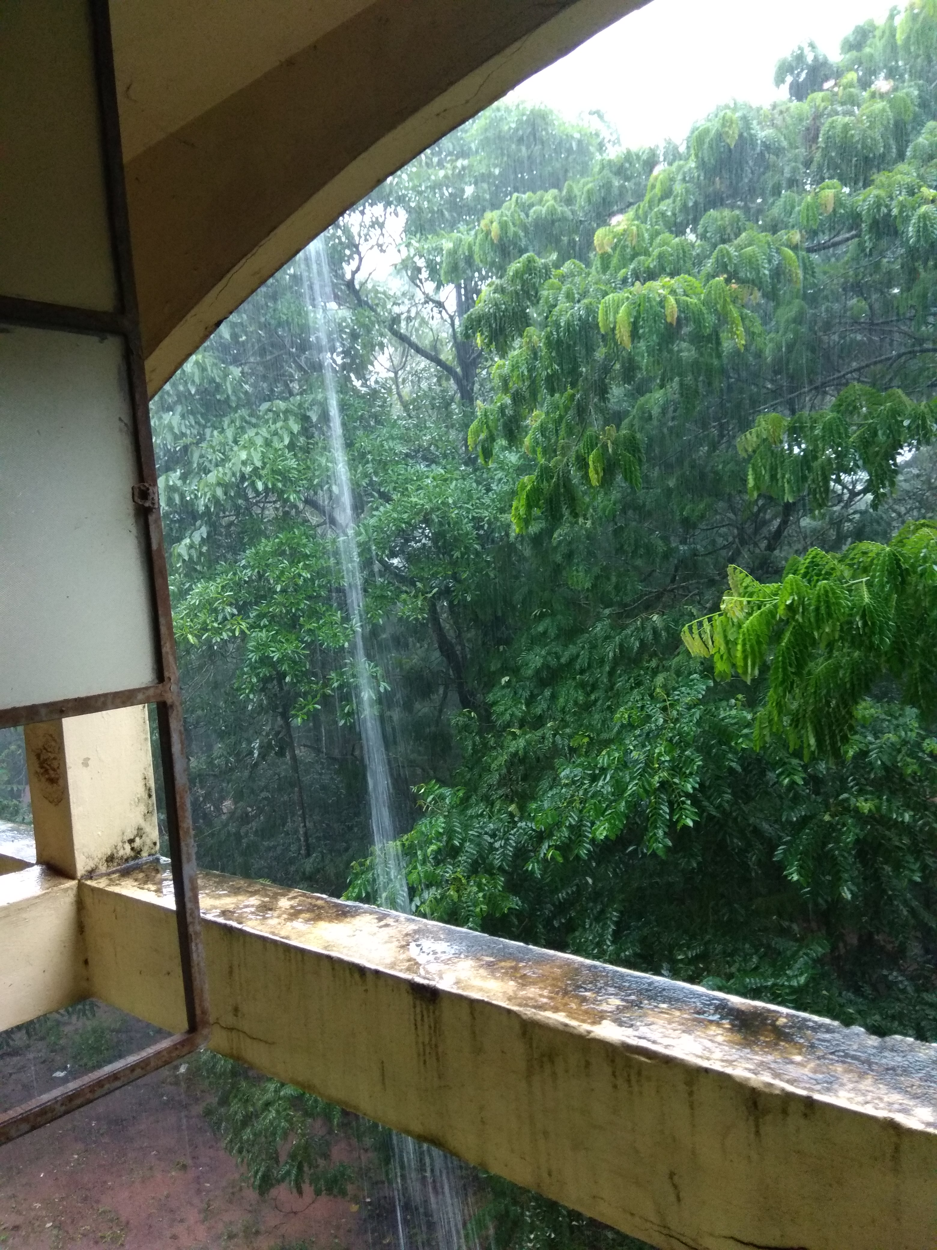 ക്ലാസ്സ് മുറിയിലെ മഴക്കാഴ്ച്ച, ഫാറൂഖ് കോളേജ്